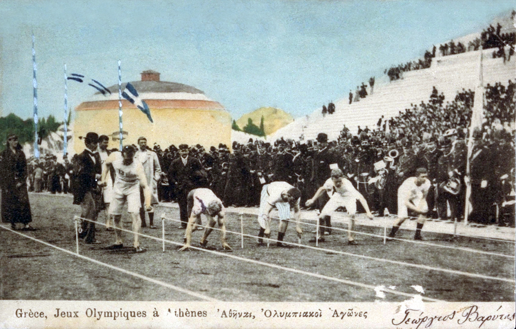 Échauffement pour les 100m de course à pied aux Jeux Olympiques, autochrome, à Athènes (Grèce), 1896.